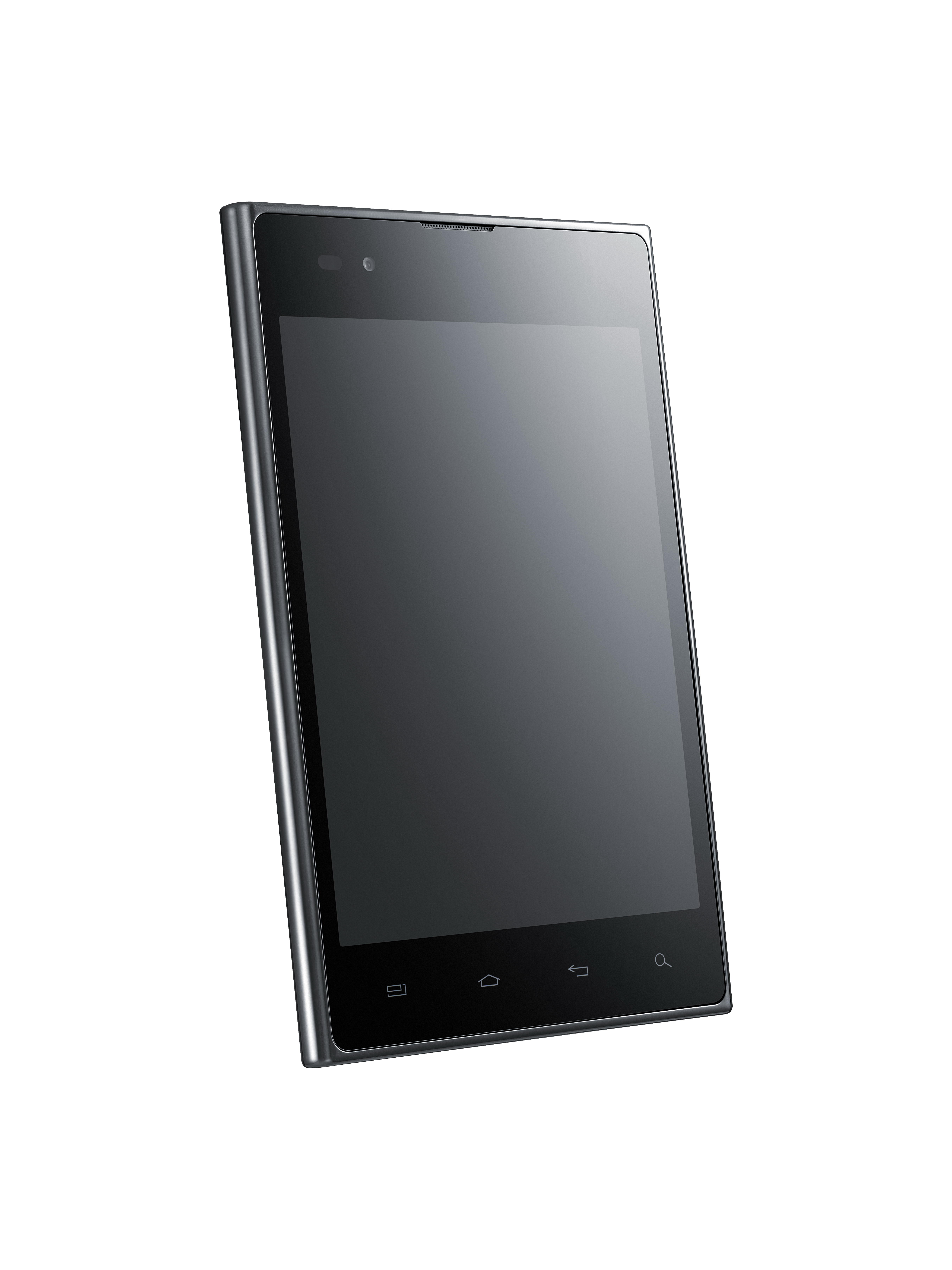 LG전자가 3월 5일 SK텔레콤과 LG유플러스를 통해 5인치 대화면 LTE스마트폰 ‘옵티머스 Vu:(뷰)’를 국내 시장에 출시하며 휴대폰 명가의 재건에 나선다. 사진] LG전자 모델이 5인치 대화면 ‘옵티머스 Vu:(뷰)’ ※ LG전자 뉴스룸 에서 관련 보도자료를 확인실 수 있습니다.